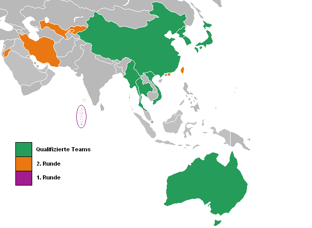 Fußball-Asienmeisterschaft der Frauen 2010/Qualifikation